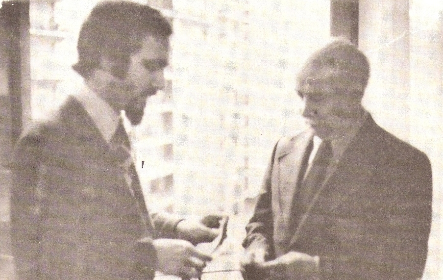 antonio las heras (izquierda) escritor español, junto a Charles Berlitz (izquierda) escritor estodounidense